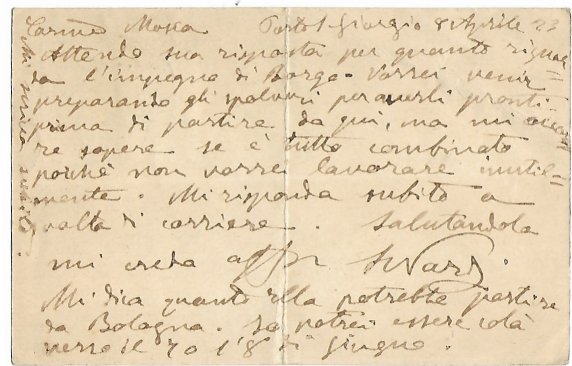 Cartolina postale spedita da Porto San Giorgio il 8 aprile 1923 da Sigismondo Nardi al pittore Antonio Mosca via dei Cappuccini, 6 Bologna per prendere accordi per i lavori di restauro e decorazione della parrocchia di Borgo Valsugana